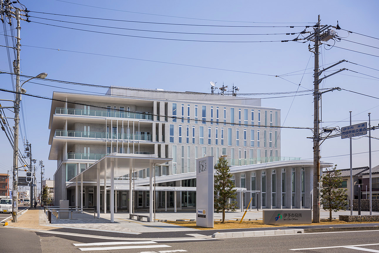 伊予市役所 新庁舎